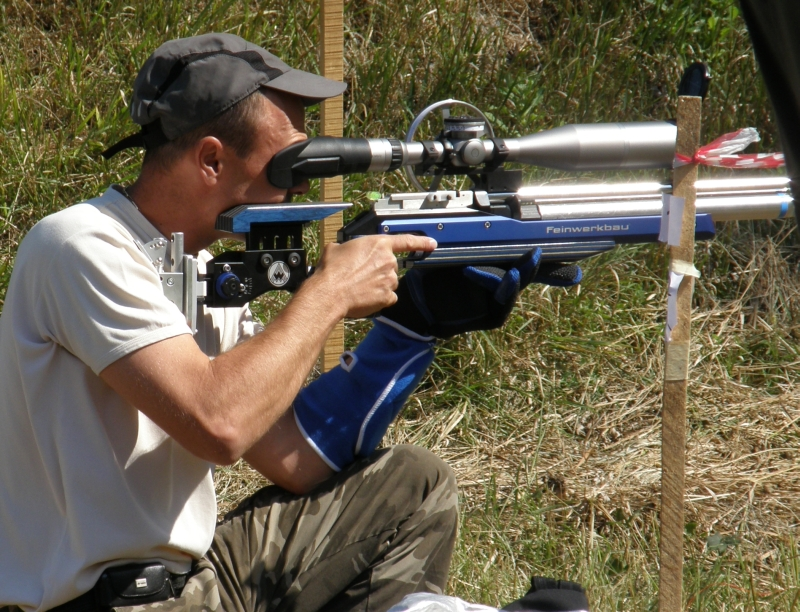 Field target OB 2009.